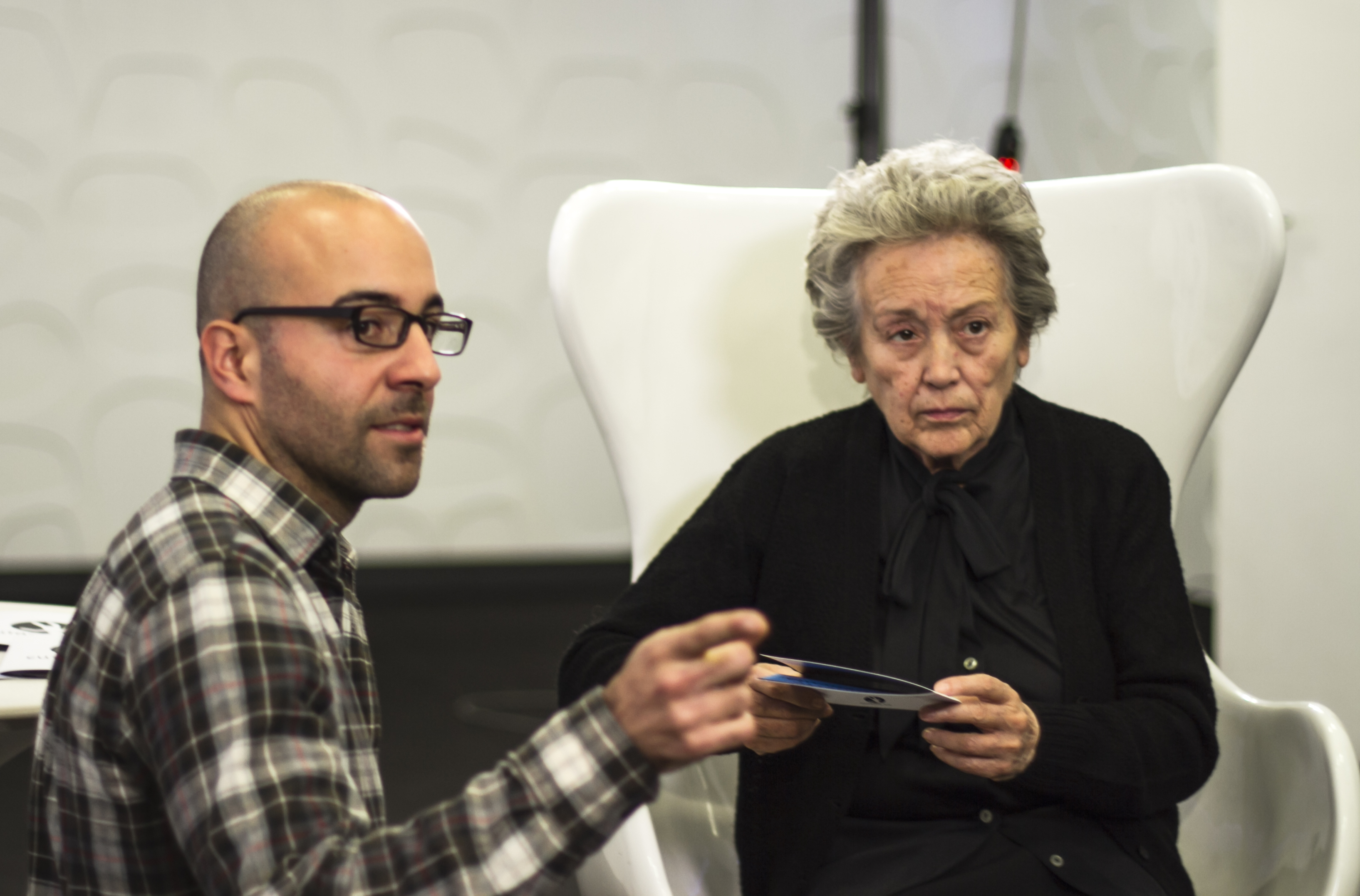 Durante el rodaje del corto "Eutanas, SA", Víctor Nores dirige a Amparo Baró.